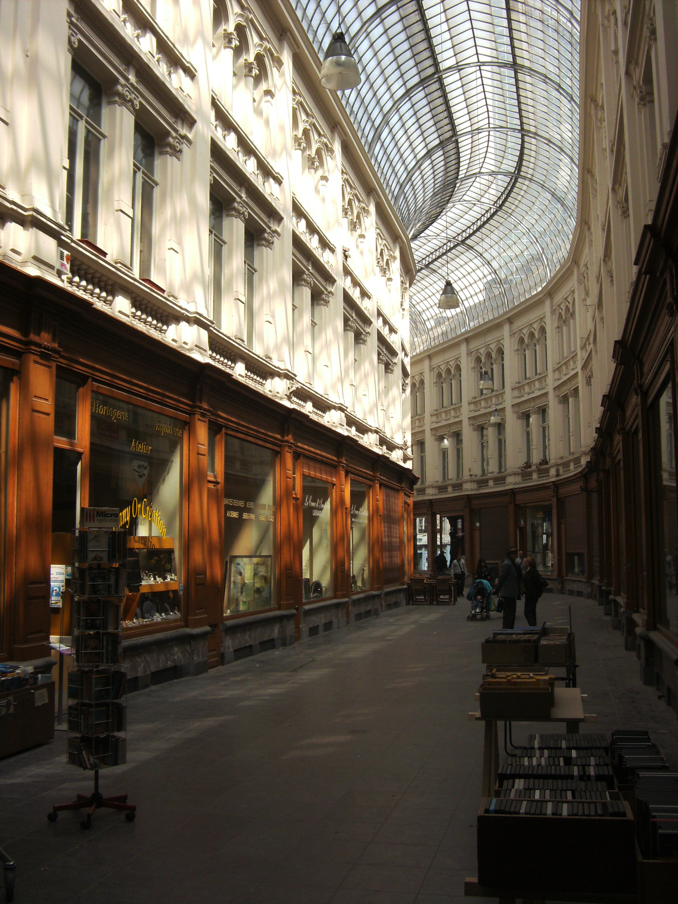 Charleroi (Belgique) - Passage de la Bourse - Galerie couverte édifiée de 1890 à 1893 par l'architecte Legraive.